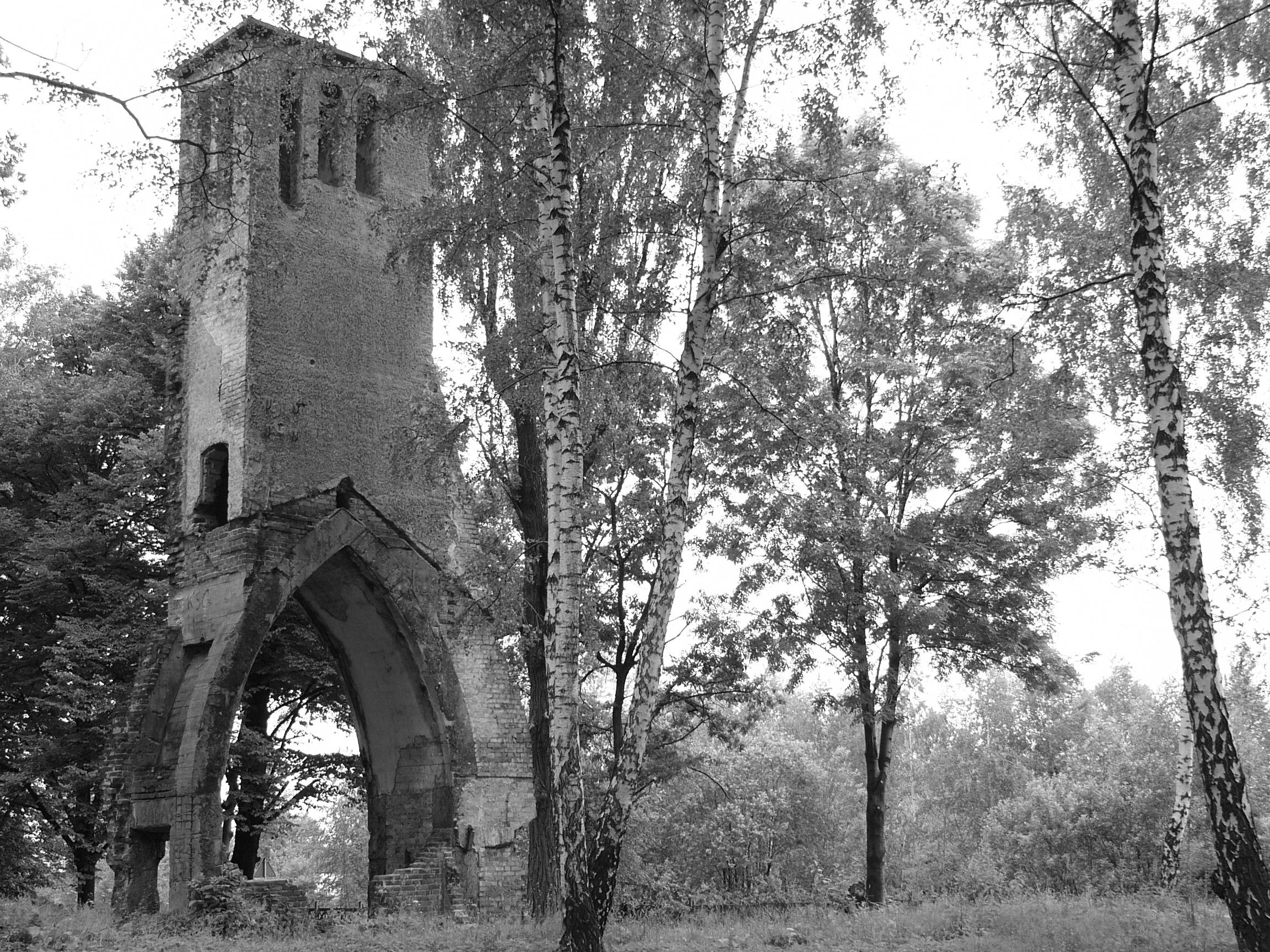 Ruinen des Krematoriums auf dem Gleiwitzer Hauptfriedhof. Ruiny krematorium na gliwickim cmentarzu centralnym.